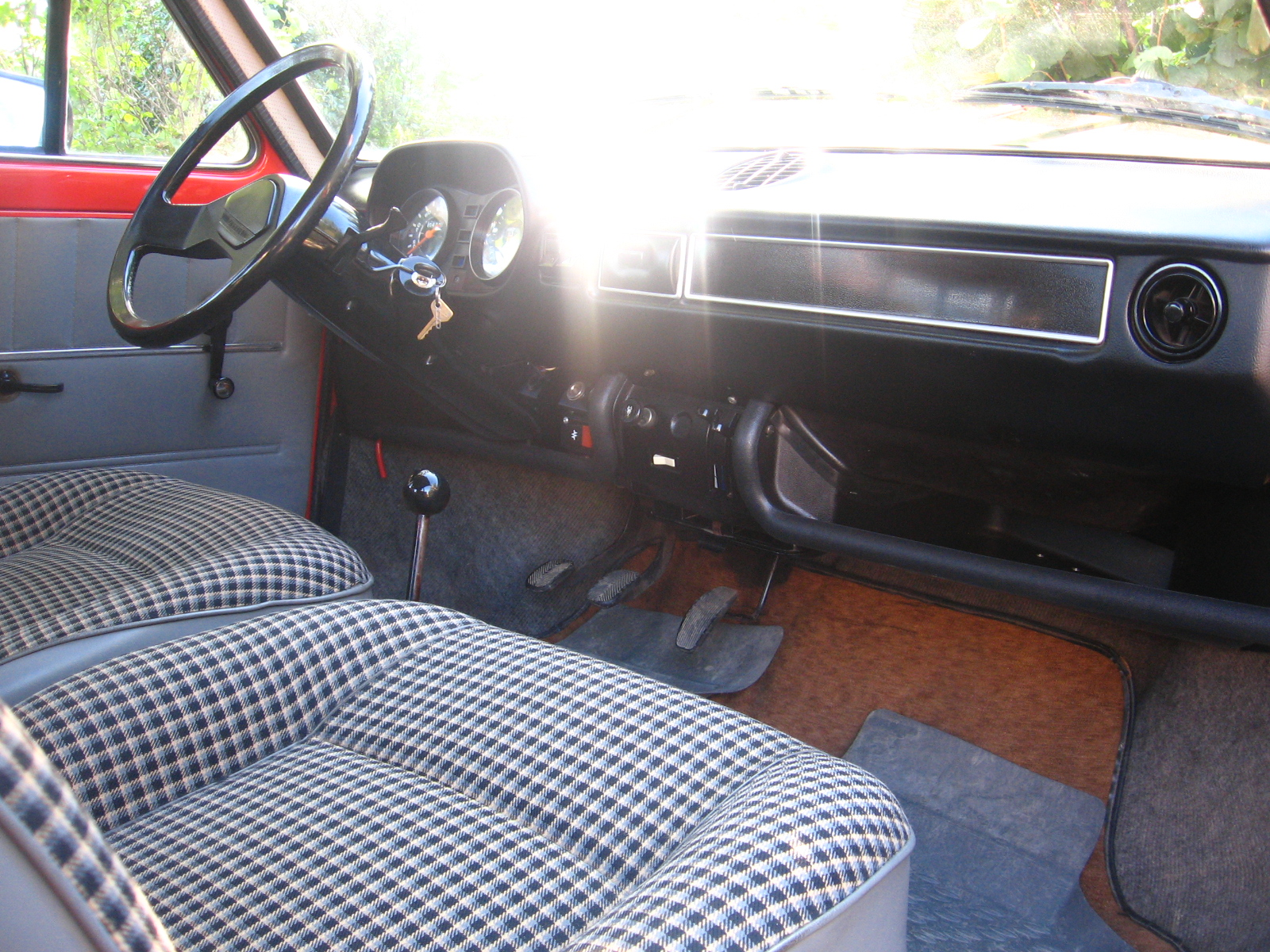 Zastava 101 Confort, sprednji sedeži in armaturna plošča - notranjost.